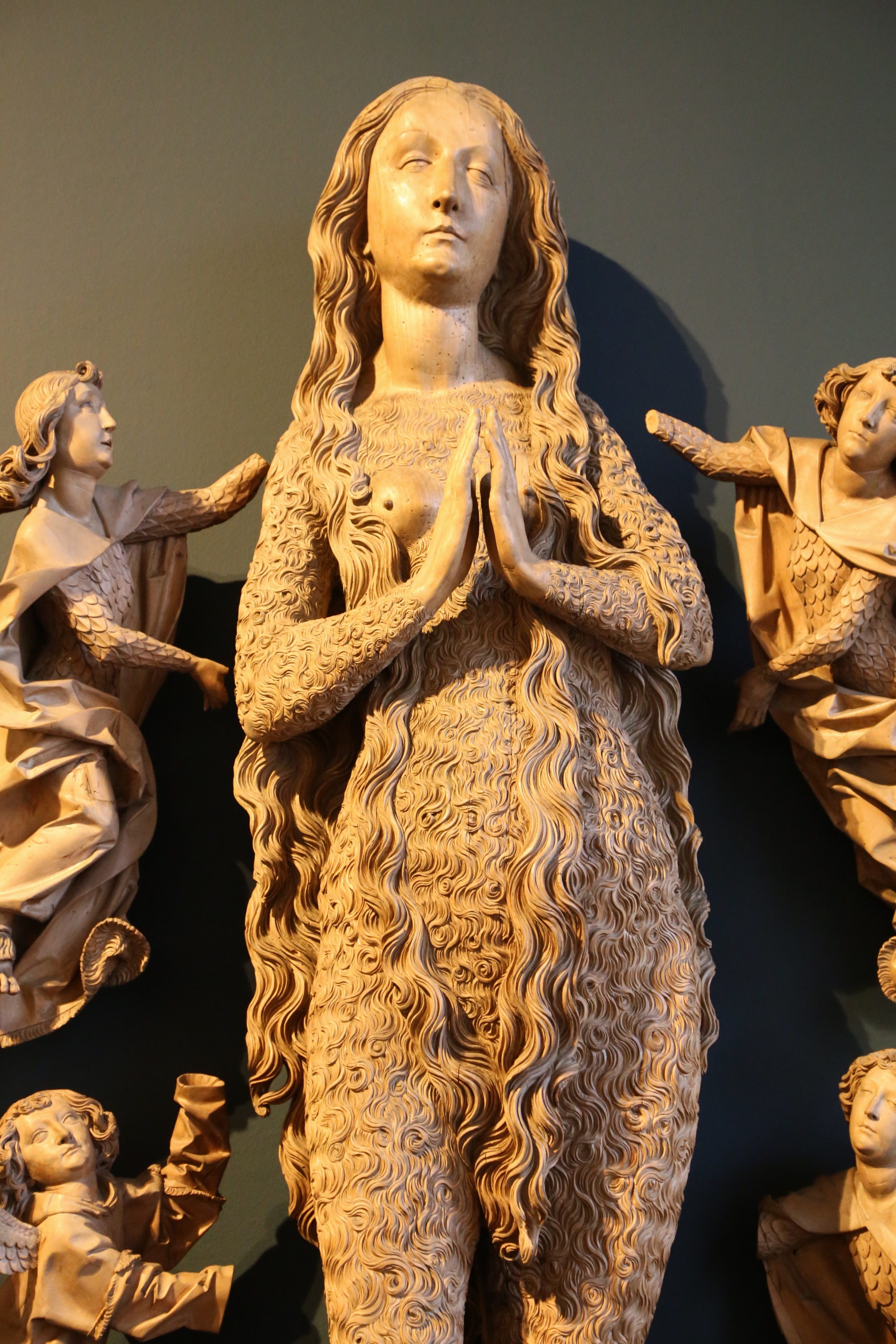 Tilman Riemenschneider, Heilige Magdalena von Engeln erhoben, aus dem Hochaltar von Münnerstadt, 1490/92, Bayerisches Nationalmuseum